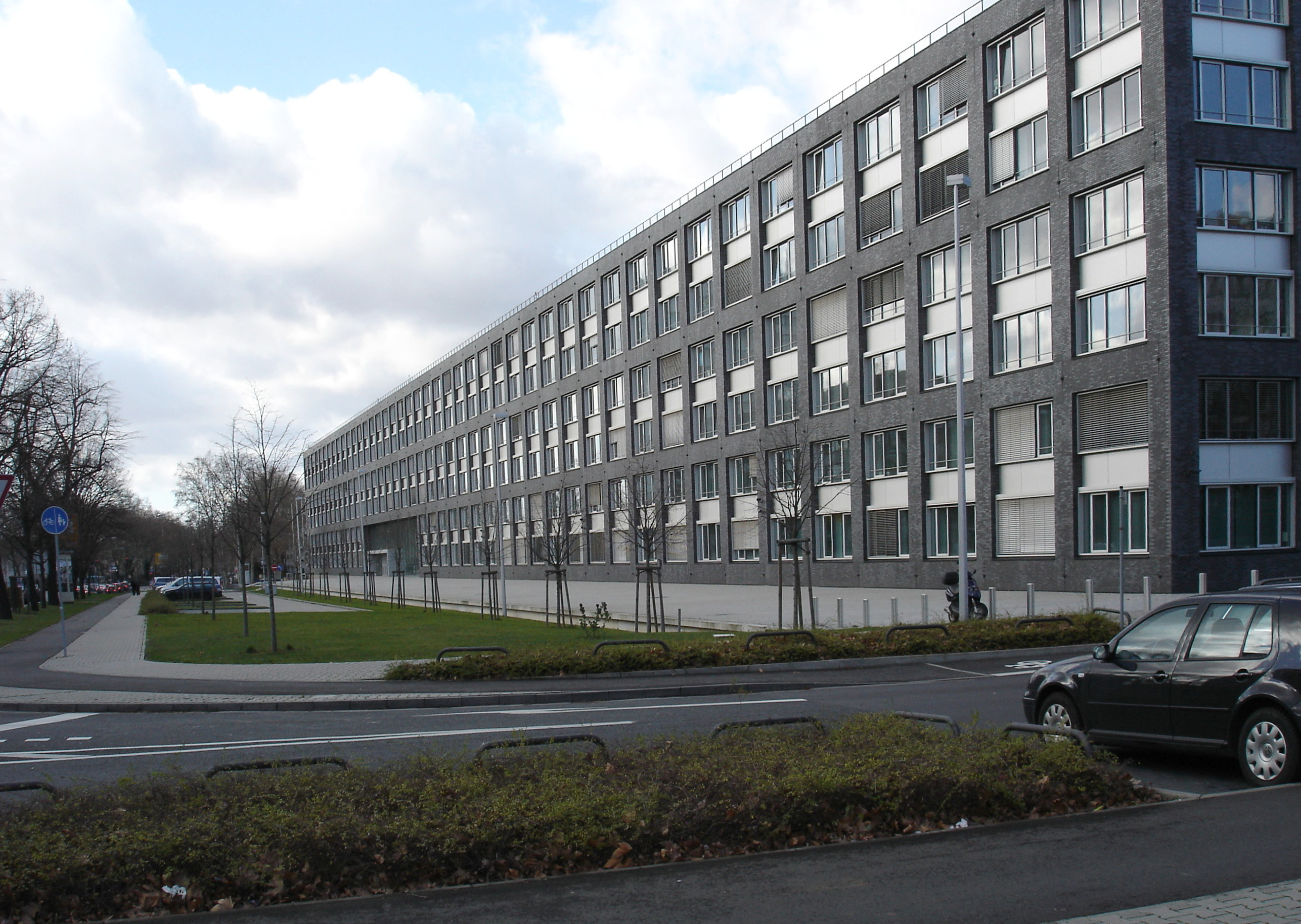 Polizeipraesidium in Frankfurt am Main